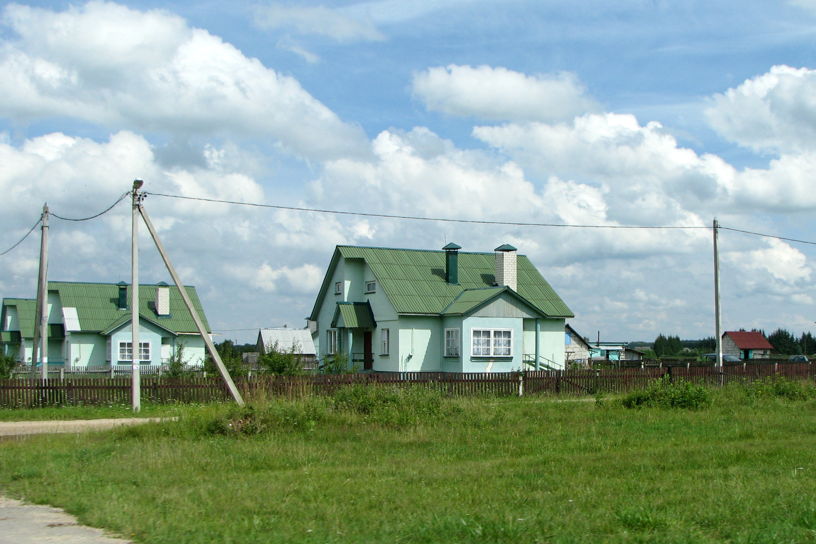 Посёлок Юратишки, Ивьевский район, Гродненская область, Беларусь